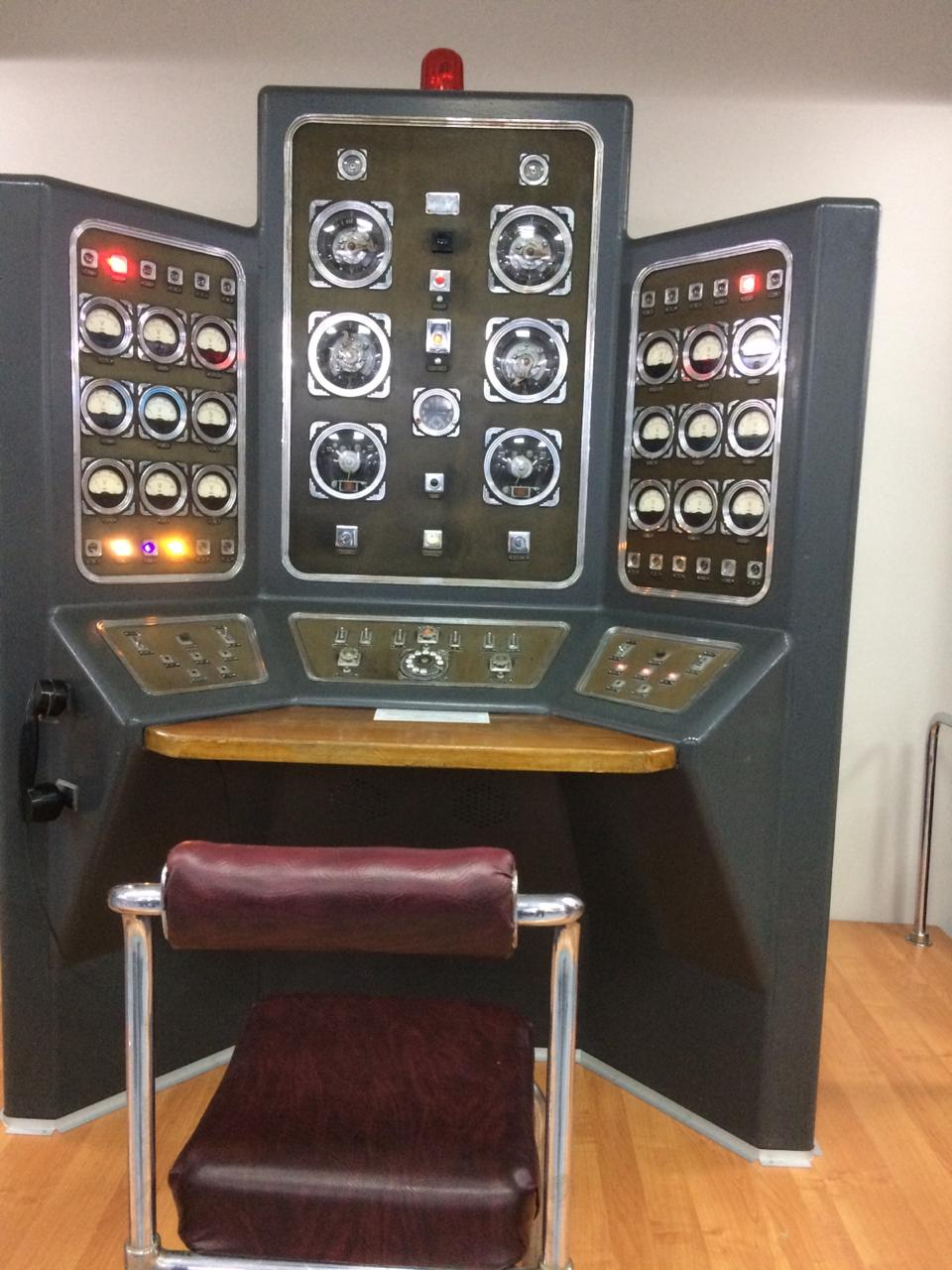 Қазақша (кирил): Семей полигонының басқару пульті